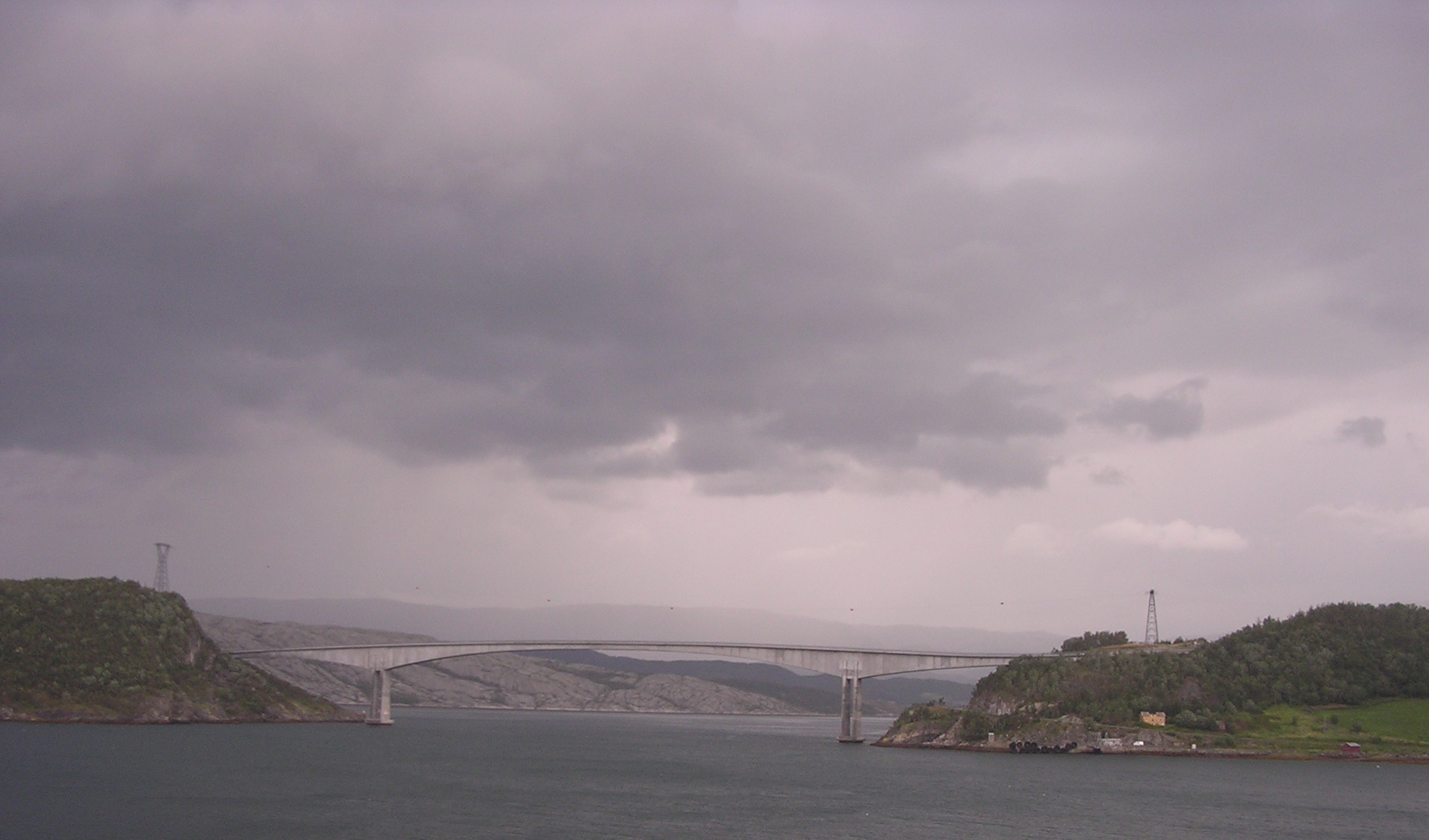 Sundøybrua i Leirfjord kommune, Nordland